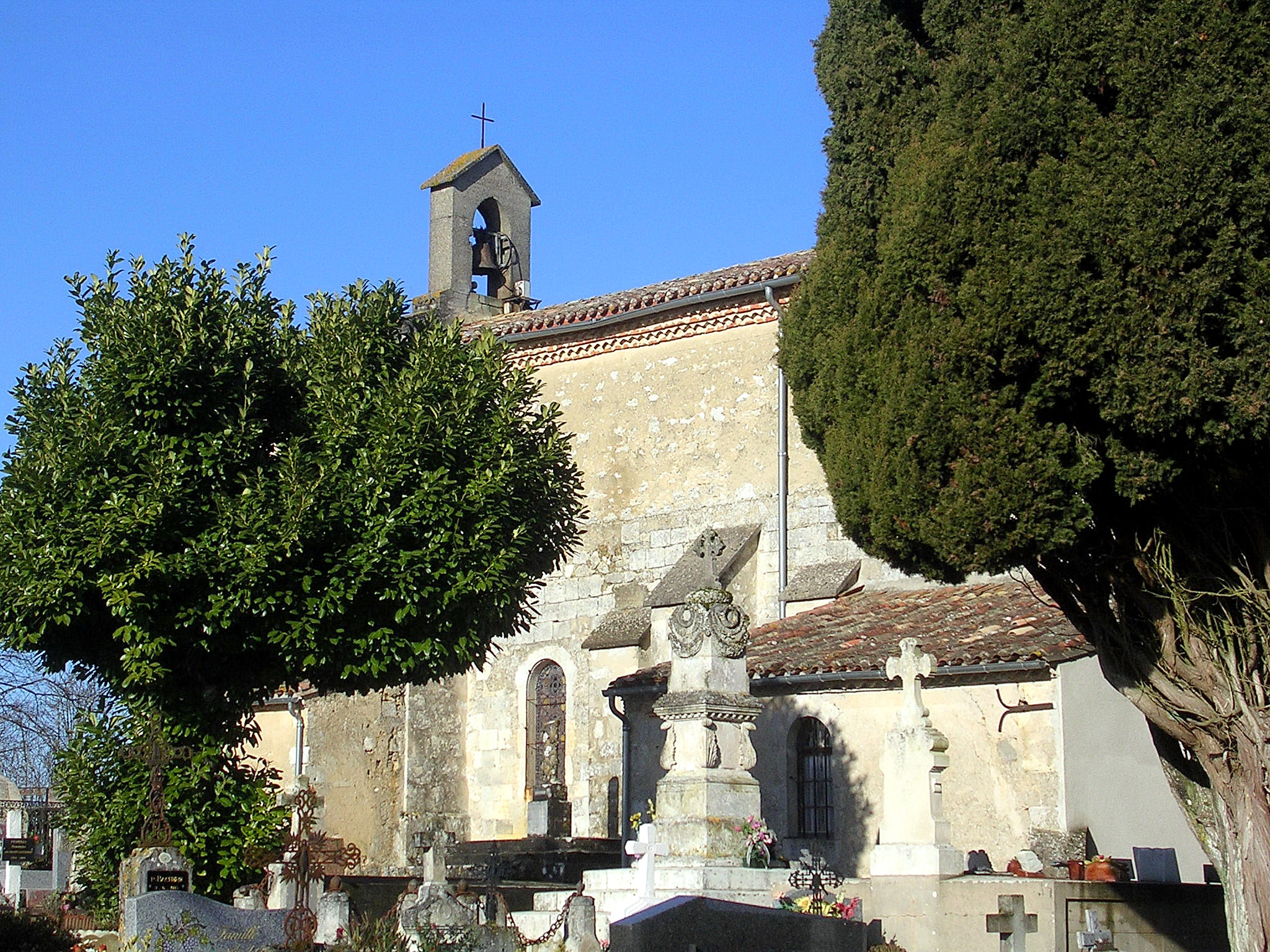 église de Xaintrailles (Lot-et-Garonne, France)